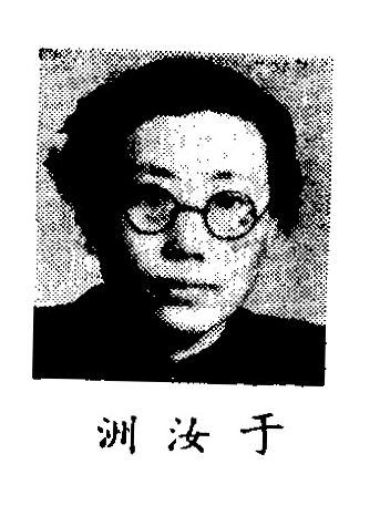 中文（中国大陆）: 制憲國民大會代表